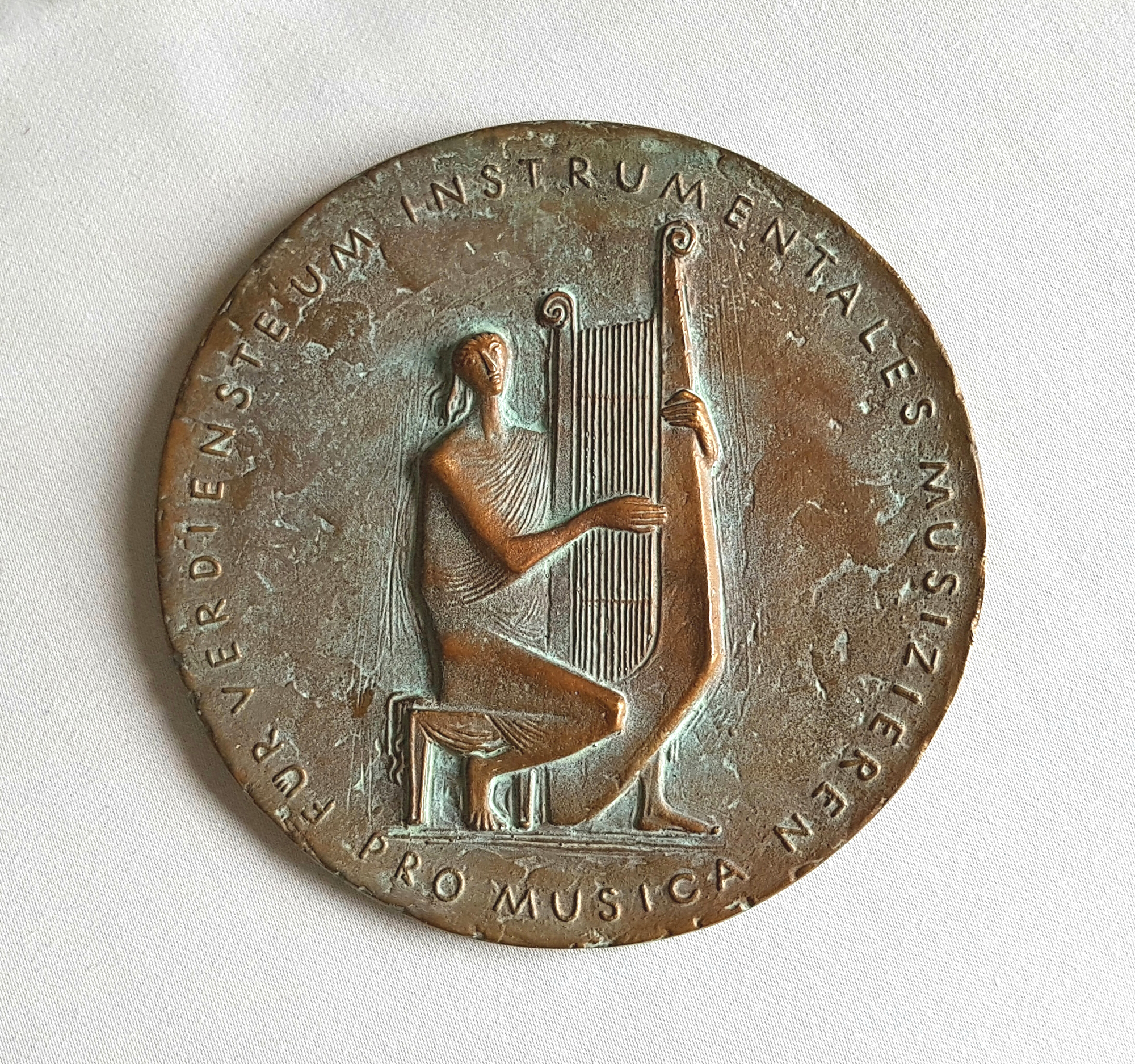 Pro Musica Plakette des Bundespräsidenten Deutschland (Bronze, ca. 16 cm